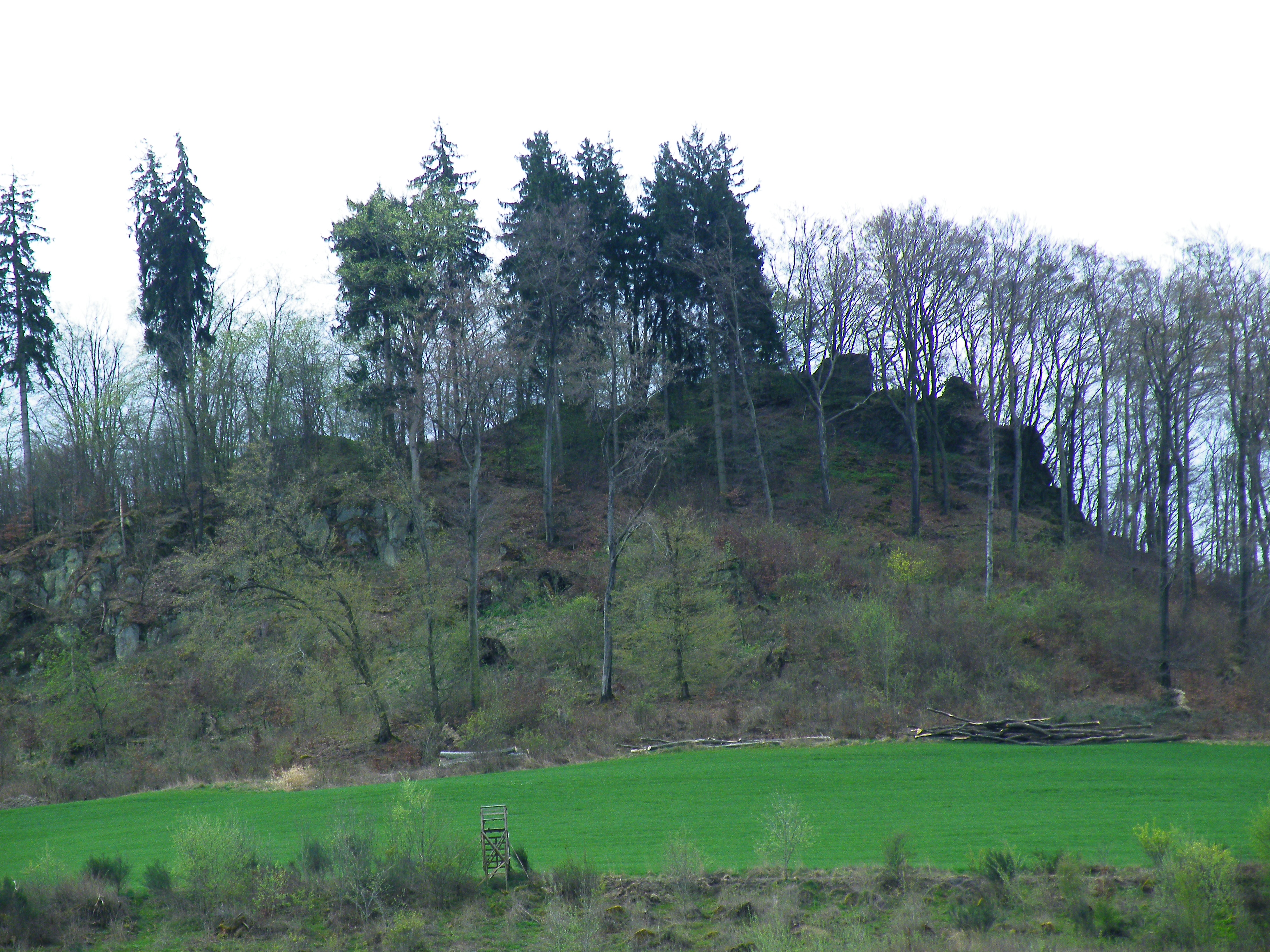 Bergkuppe Wallenstein im NSG Wallenstein von Norden aus gesehen; Meschede.